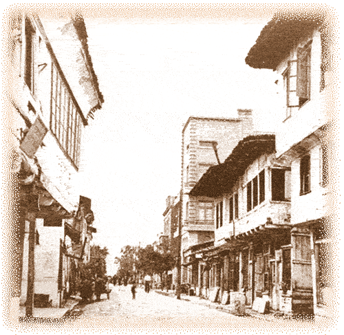 Струшката чаршија во триесеттите од XX век